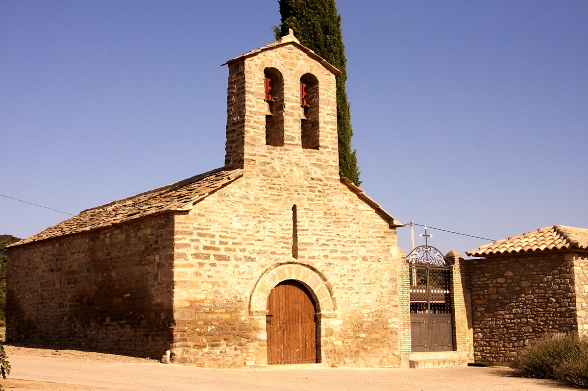 Ermita de Sant Martí a Lascuarre (la Franja-Osca)